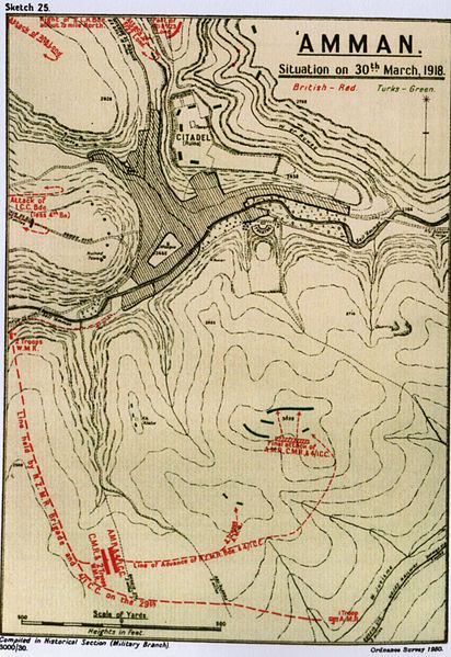 קרב עבר הירדן הראשון - מצב הכוחות סביב עמאן ה 30-מרץ-1918